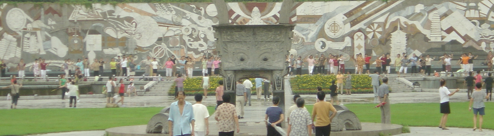 市民在七星公园内锻炼--Netluck摄于2005年6月16日